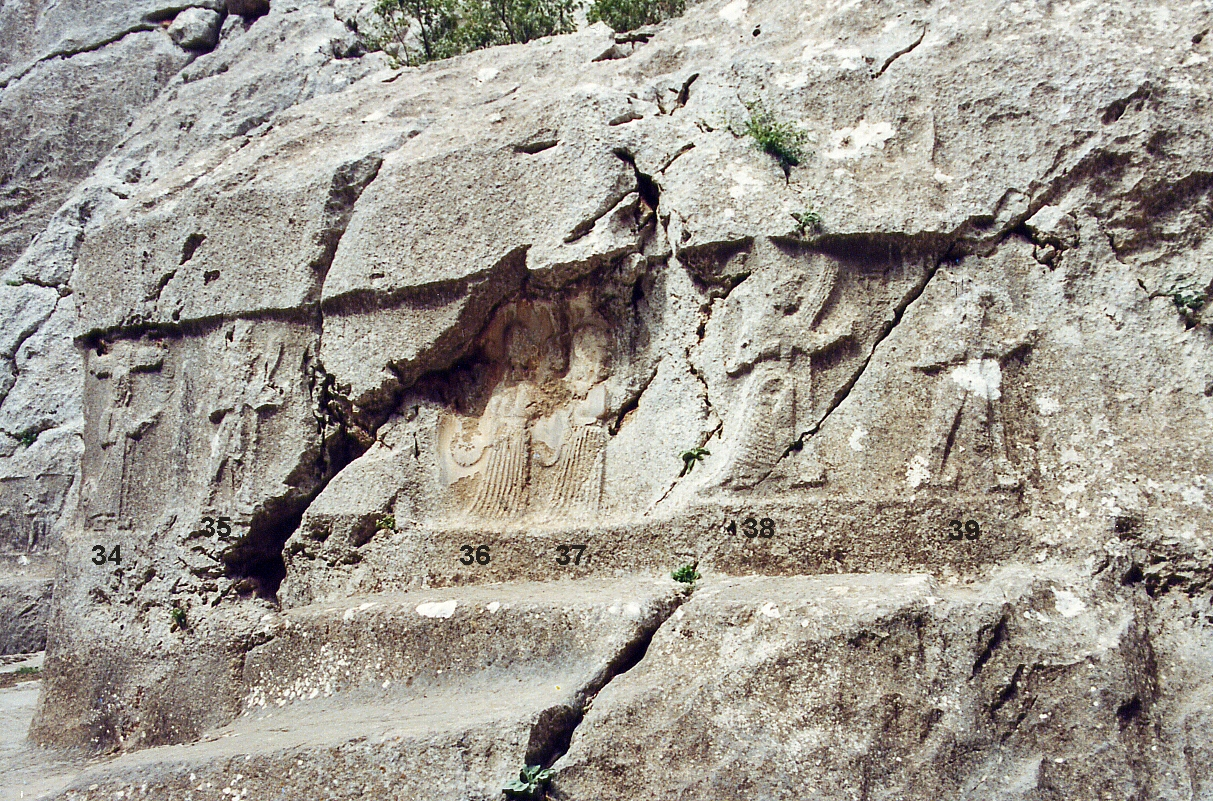 Yazılıkaya Reliefs 34-39